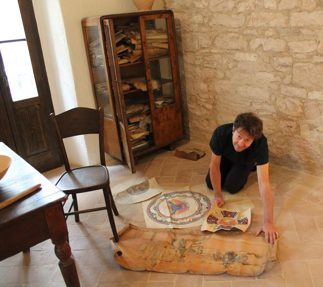 Attuale archivio del Museo Opificio Rubboli, vincolato dalla Soprintendenza Archivistica dell'Umbria